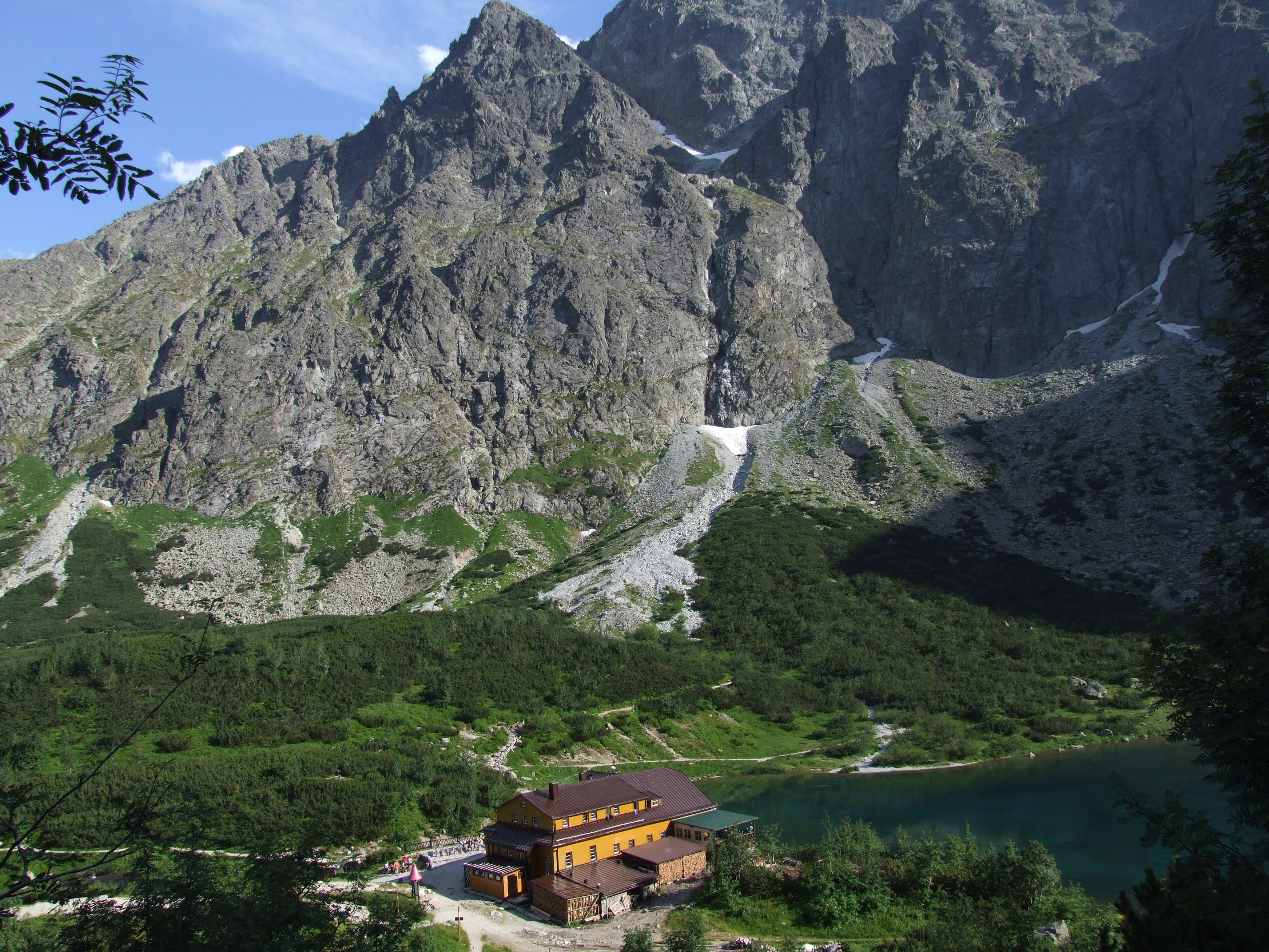 Chata pri Zelenom plese